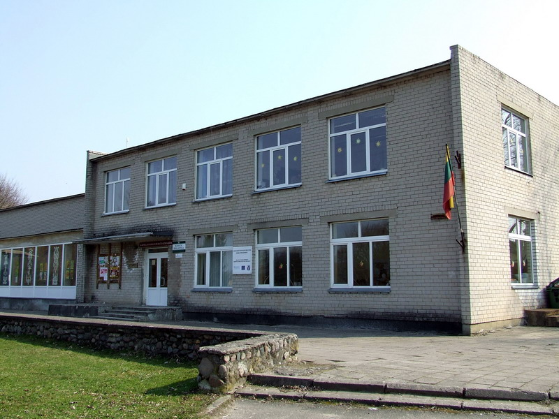 Karmėlavos Balio Buračo gimnazijos filialas Ramučiuose. Ramučių biblioteka.